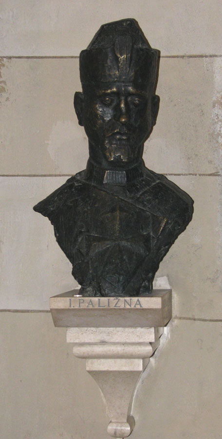 Ivan Paližna